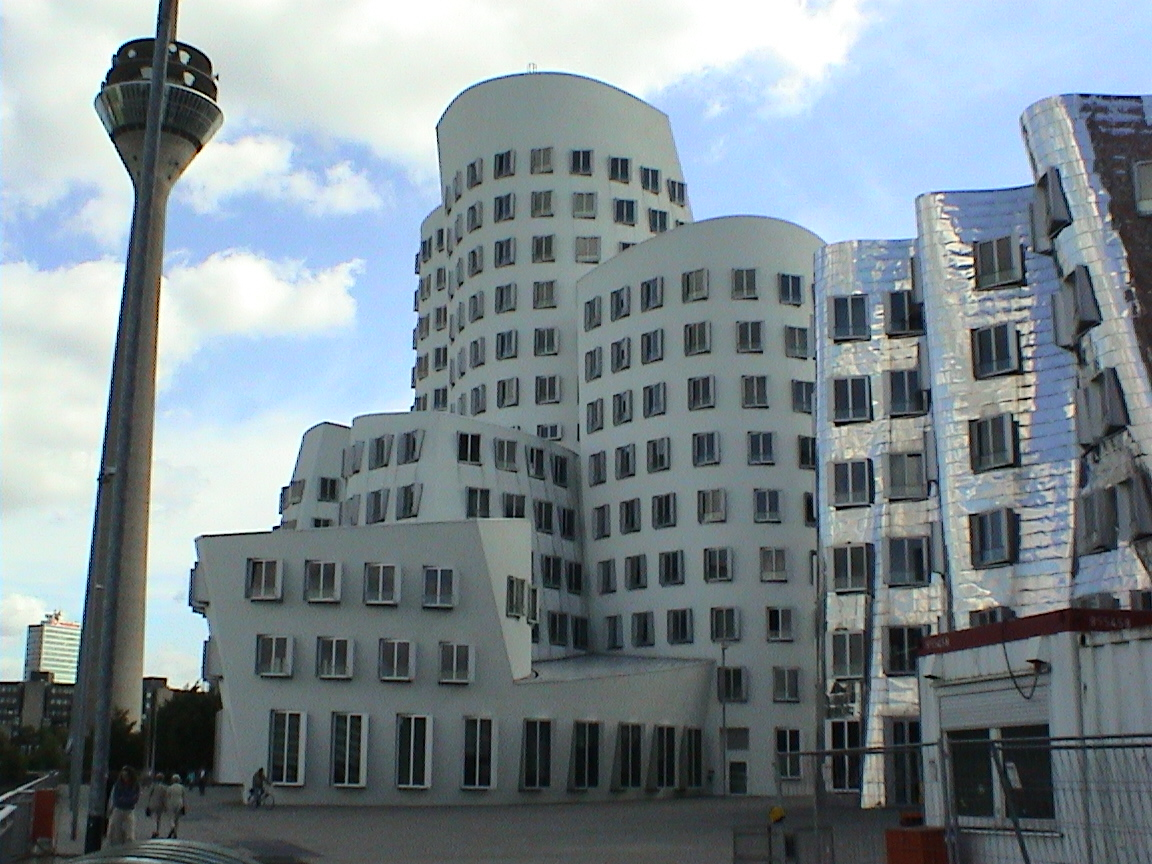 Düsseldorf, September 2003.